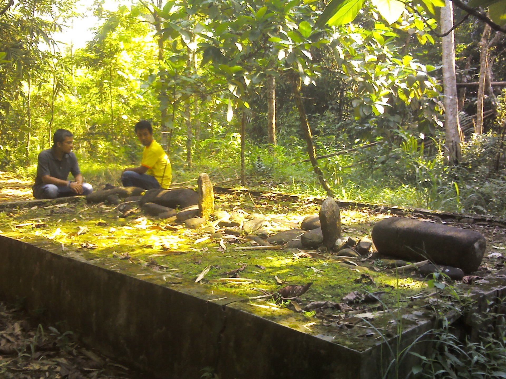 Benda Purbakala di Banyumas.